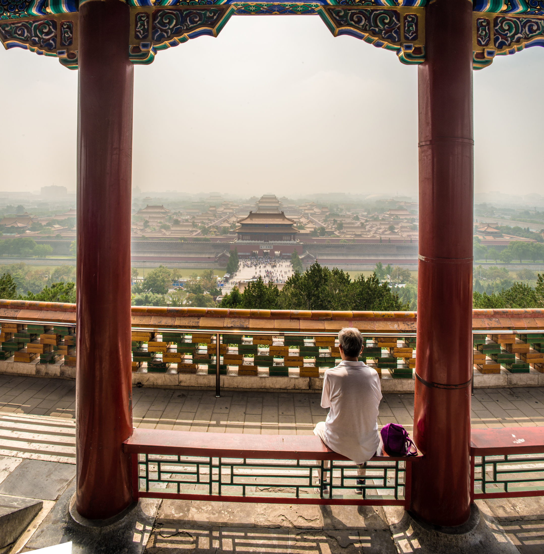 Un hombre mira la Ciudad Prohibida de Beijing, desde el parque JingShan. Una espesa capa de bruma y contaminación cubre la capital de manera permanente.